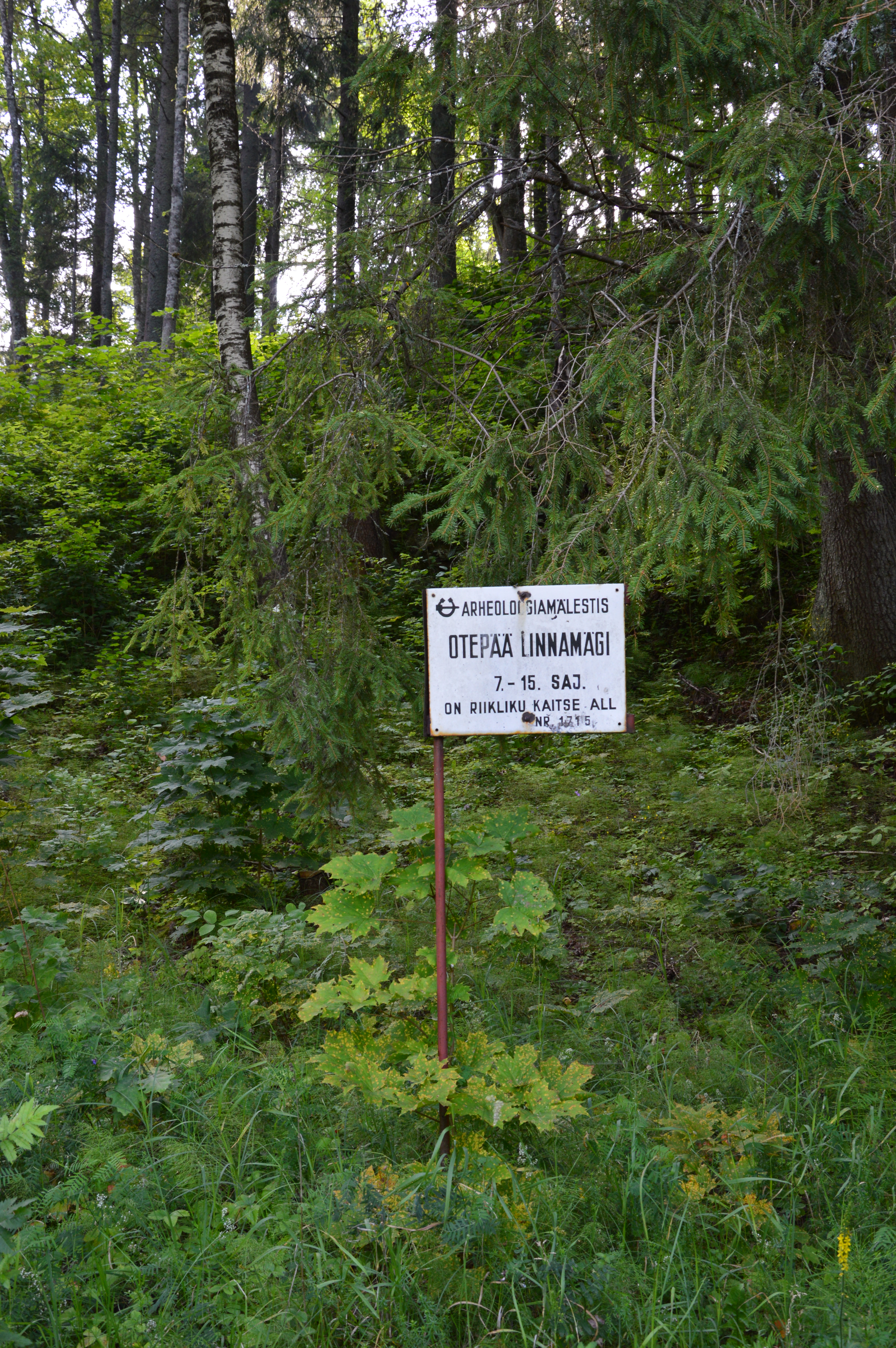 Otepää linnamägi